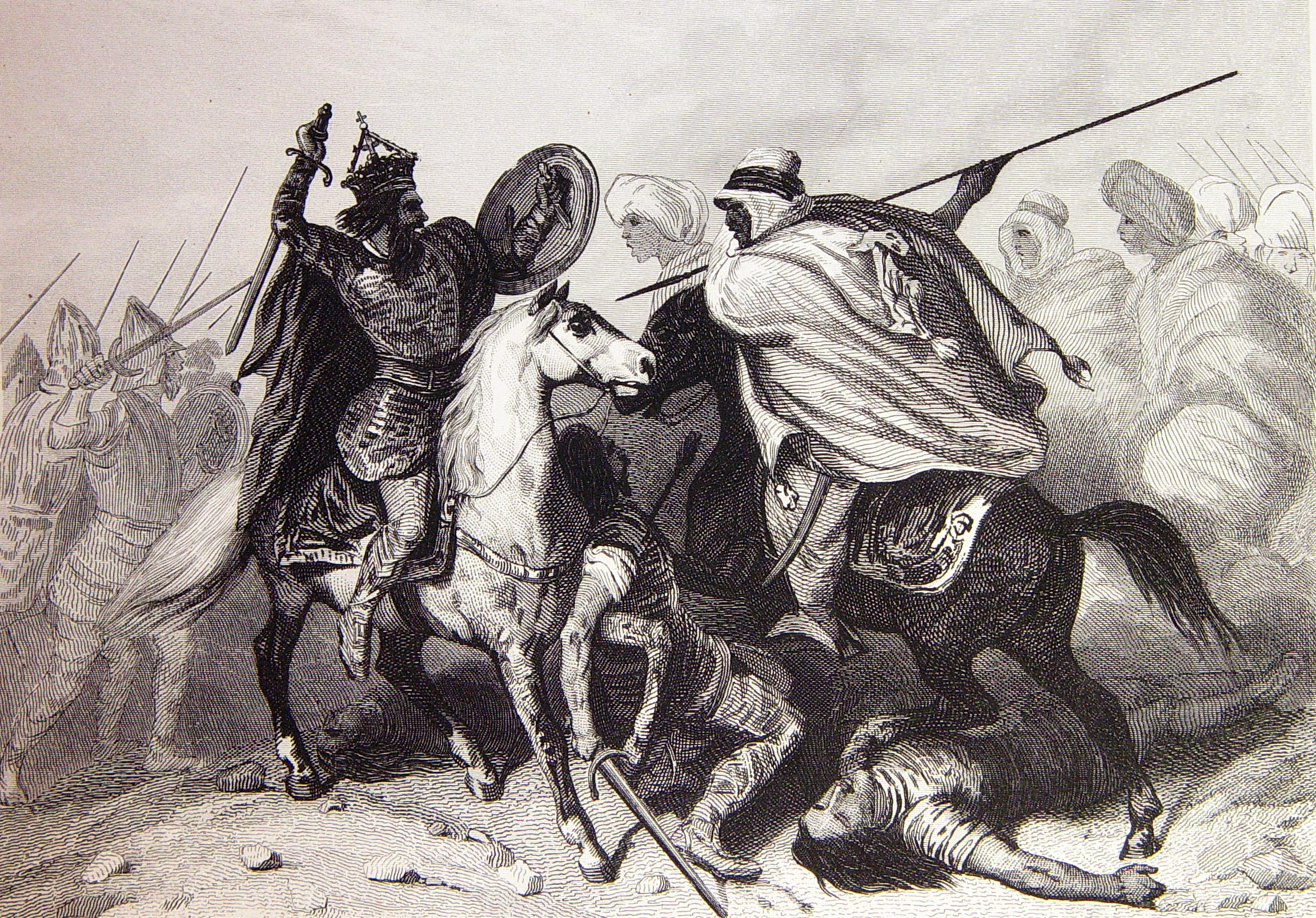 Ilustraciones pertenecientes al libro: Las glorias nacionales : grande historia universal de todos los reinos, provincias, islas y colonias de la Monarquía Española, desde los tiempos primitivos hasta el año de 1852. - Madrid [etc.] (Barcelona : Imprenta de Luis Tasso) Librería de la Publicidad [etc.], 1852-1854.